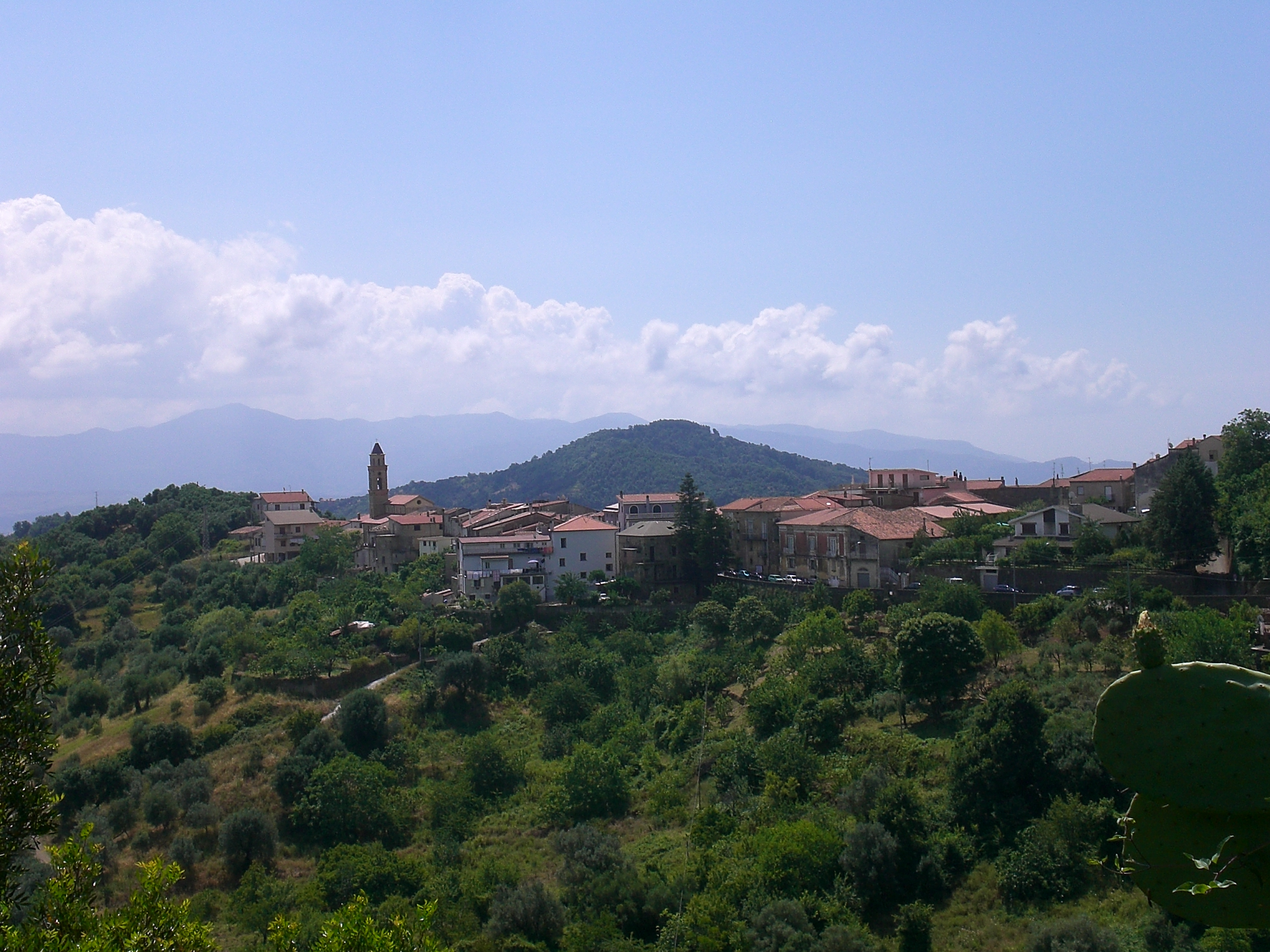 Panorama di Stella Cilento